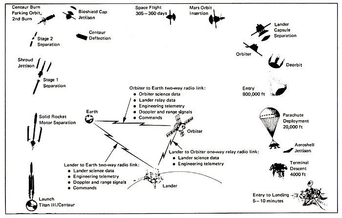 Tagalog: Ang larawang ito ay nagpapakita ng mga pangyayari sa programang Viking mula sa pag-alis hanggang sa pagbalik. Galing dito. Image:Viking Mission Profile.gif